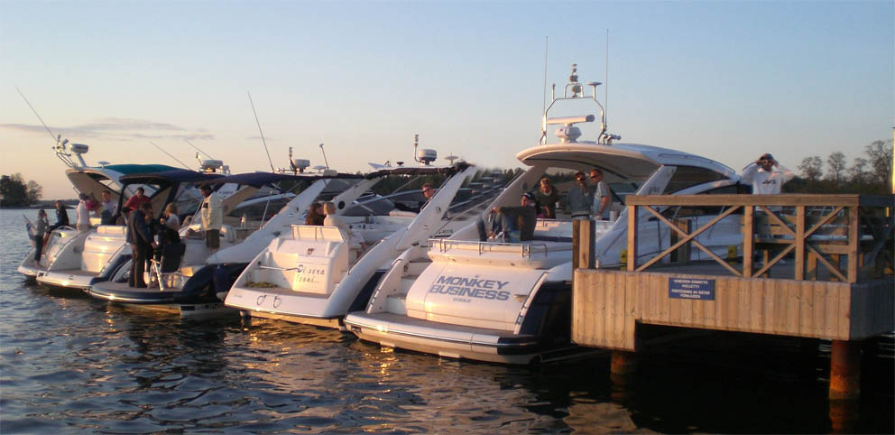 GÅSGRUND 2008